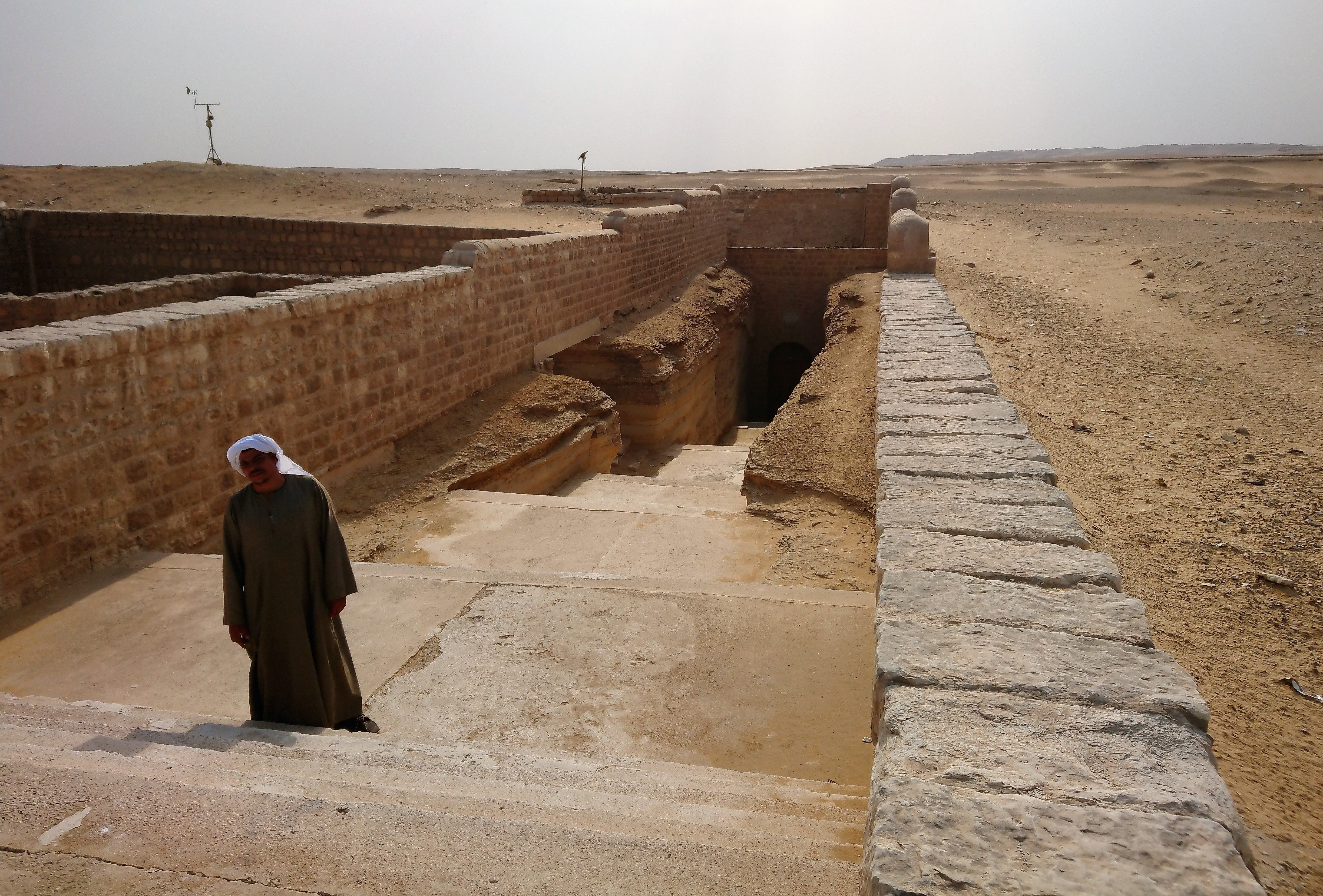 Wejście do Serapeum